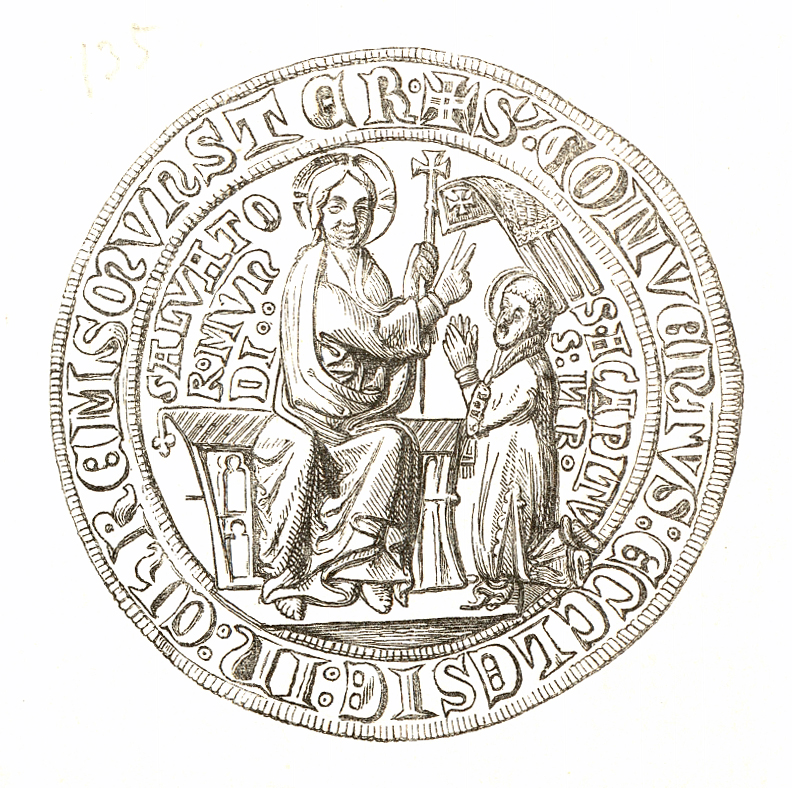 Zeichnung aus dem Jahrbuch der kaiserl. königl. Central-Commission zur Erforschung und Erhaltung der Baudenkmale III. 1859. Aufsatz von Karl von Sava, Sphragistiker, mit dem Titel: Die mittelalterlichen Siegel der Abteien und Regularstifte im Erzherzhogtum Österreich ob und unter der Enns Zuordnung der Zeichnungen entsprechend den Dateinamen